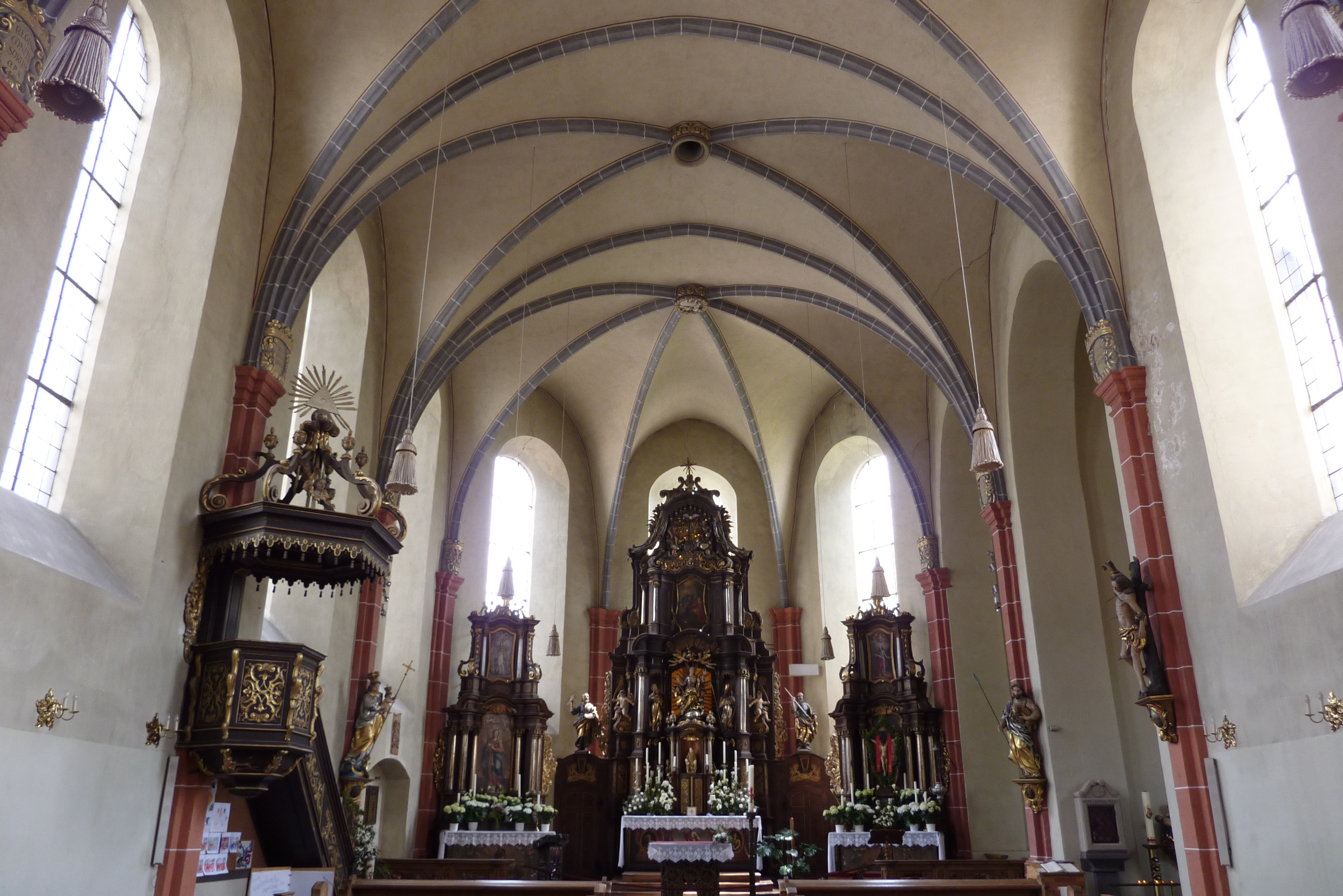 Niederbreisig, Ortsteil von Bad Breisig, Katholische Kirche St. Marien, Innenansicht mit Hauptaltar